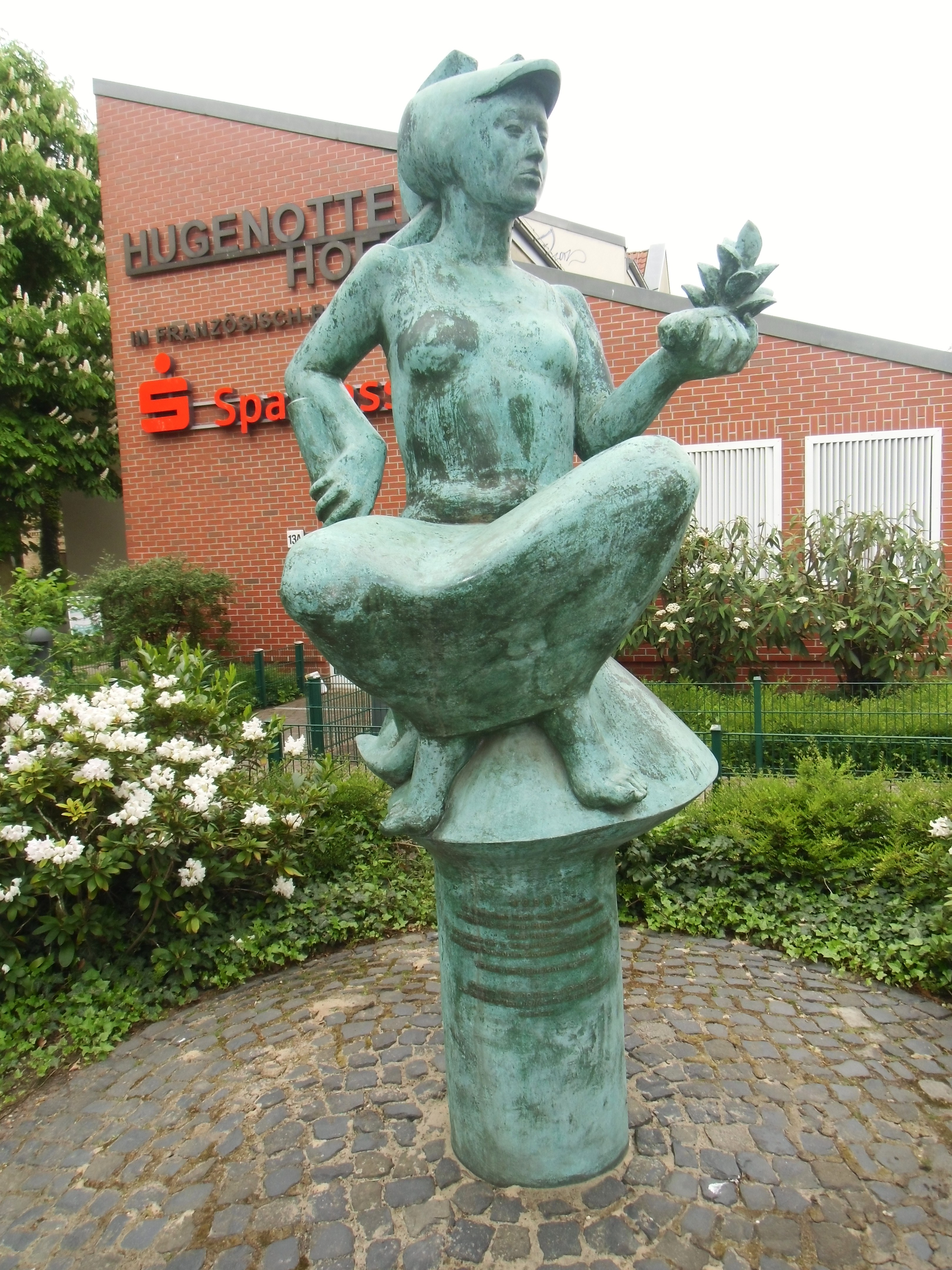 Denkmal vor dem Hugenottenhof Hauptstraße 13A, gestiftet von der Hugenottengemeinde 1995 anläßlich des 50. Jahrestages der Beendigung des 2. Weltkrieges